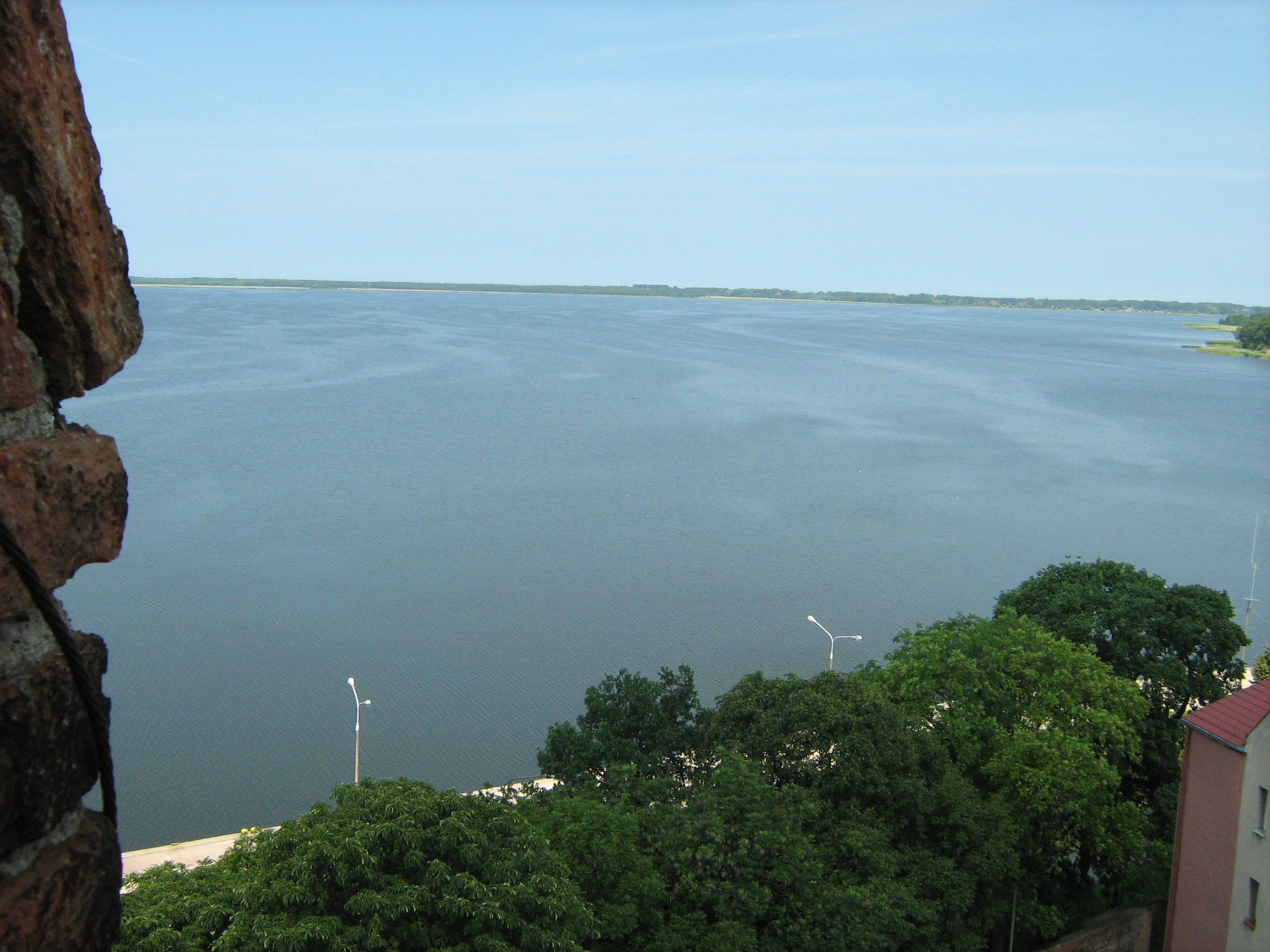 Zatoka Kamieńska